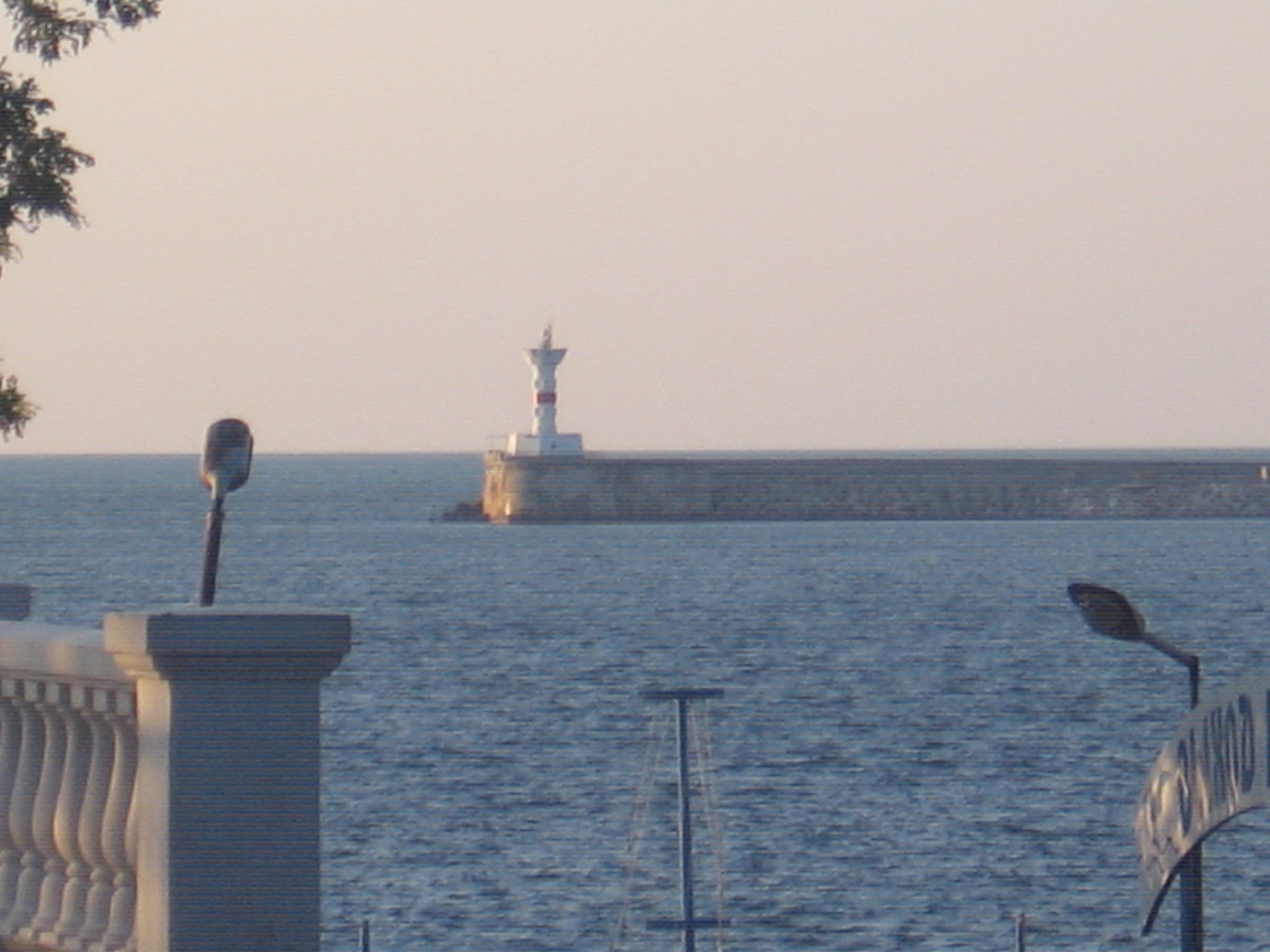 Фото